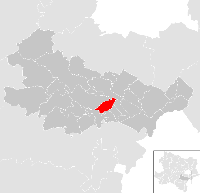 Bezirk Baden